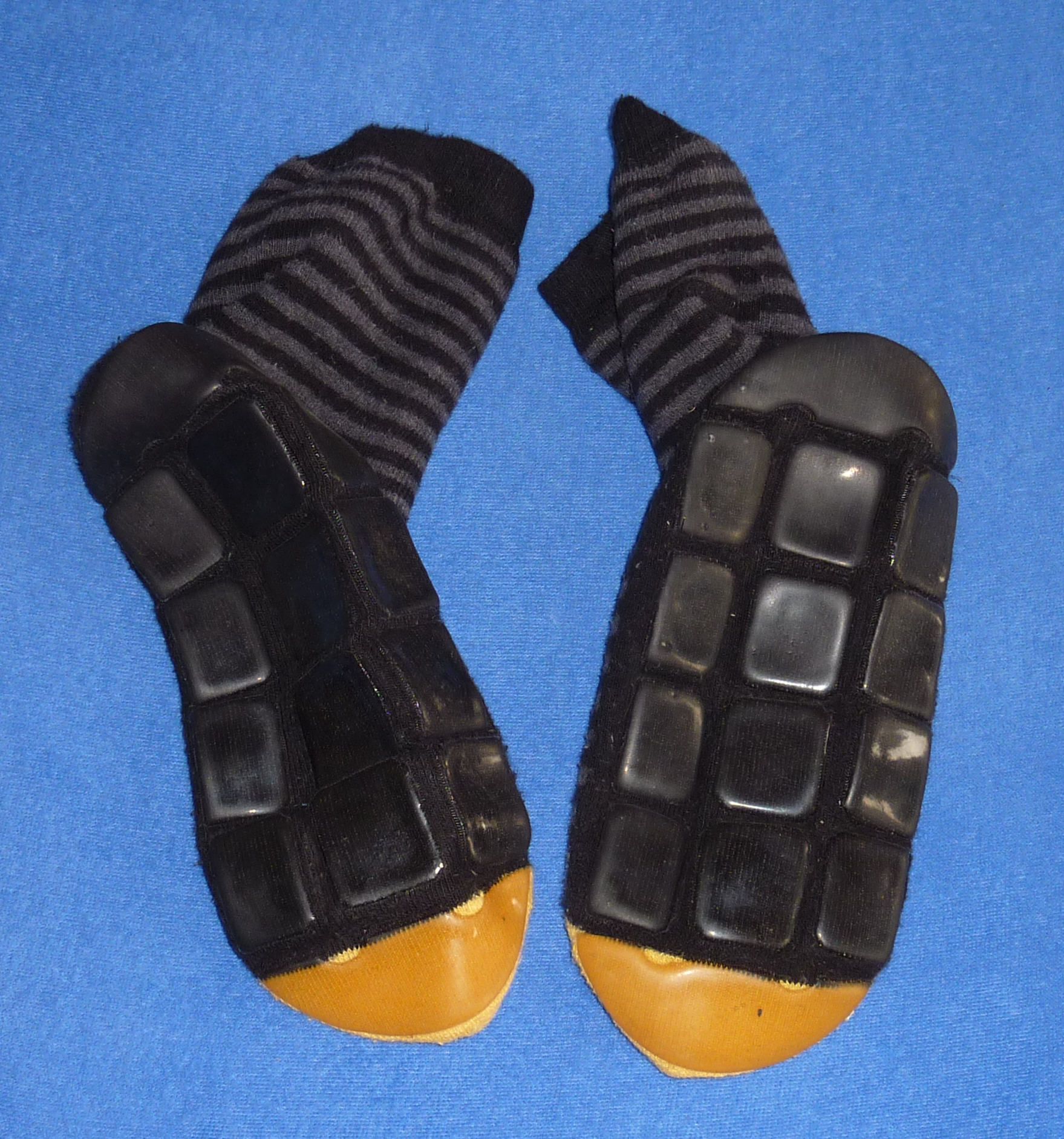 ABS-Socken